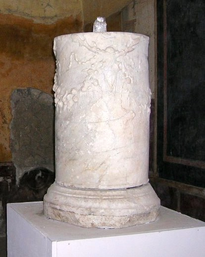 L'ara trovata di Pozzano e appartenente ad un tempio dedicato a Diana.